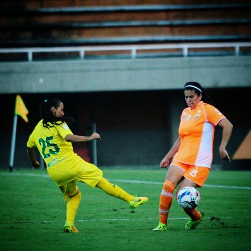 Nicol Camacho, primera jugadora Sub20 en debutar con Atlético Bucaramanga Femenino.